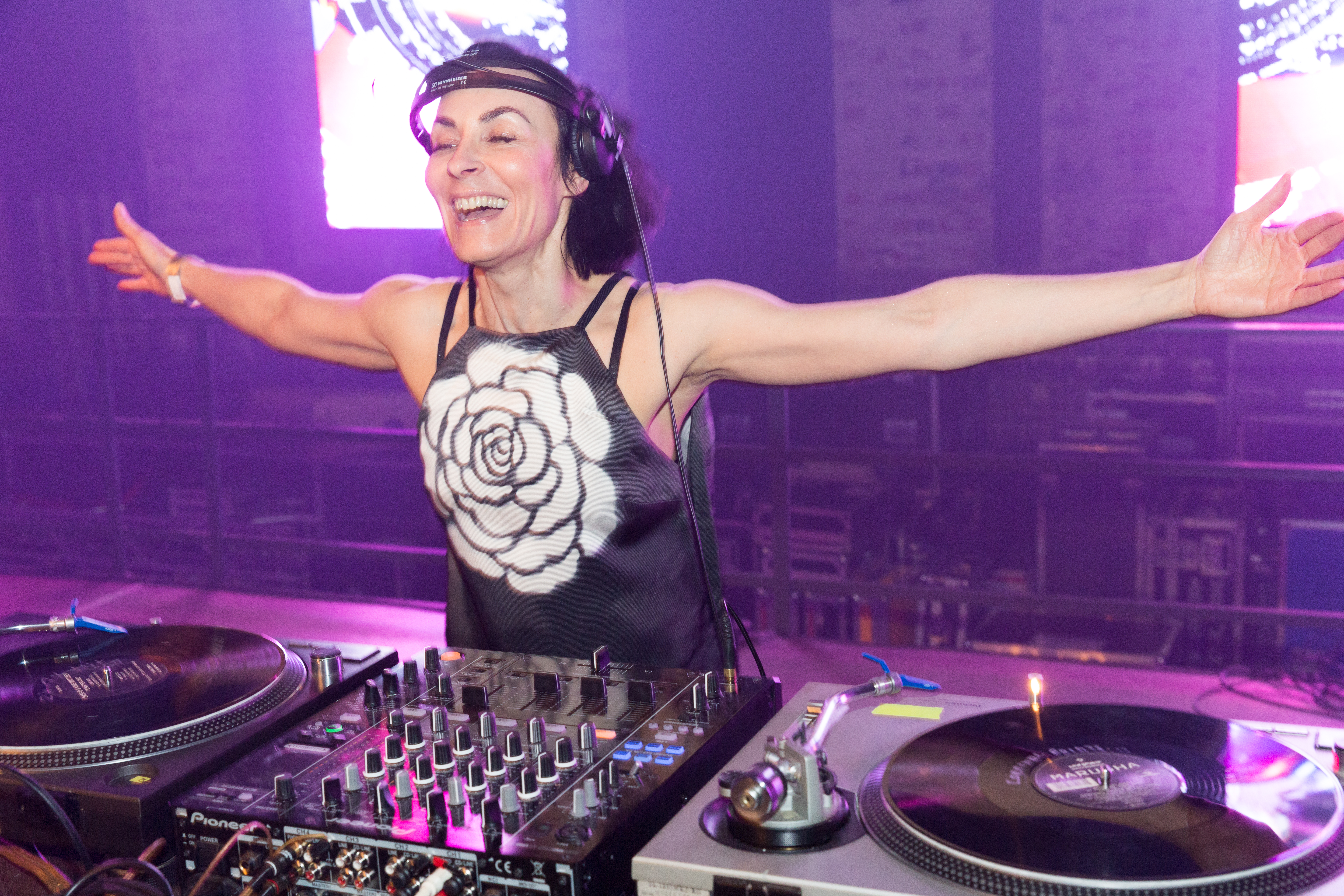 Marusha auf dem 90er Rave, Festival für Technomusik der 90er Jahre. Die Veranstellung fand in der Arena Berlin am 11.02.2017 statt. Dieses Bild wurde mit zustimmung und Akkeditierung des Veranstallter BM Eventagentur UG (haftungsbeschränkt) erstellt.